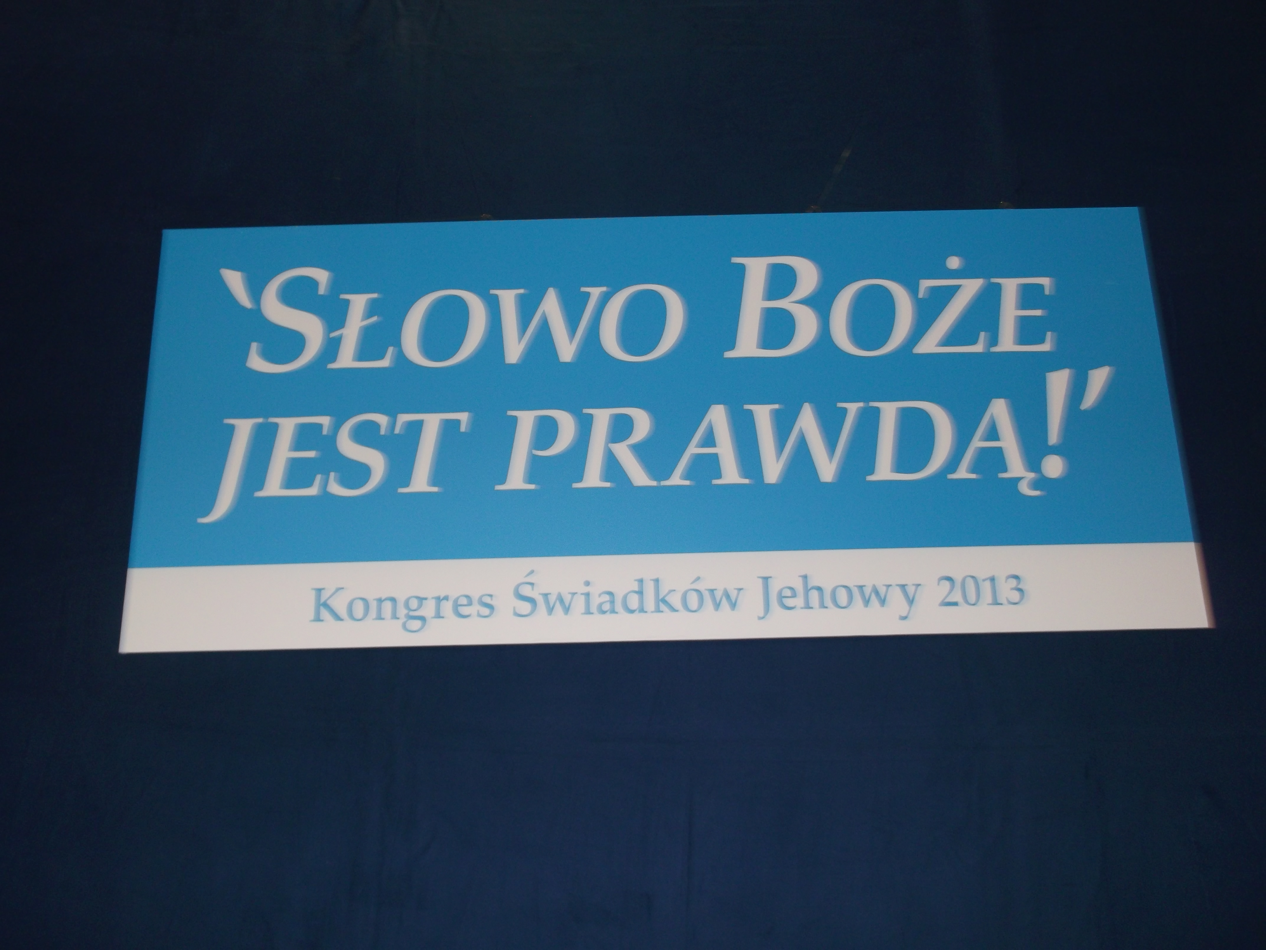 Kongres okręgowy pod hasłem: Słowo Boże jest prawdą!. Zgromadzenie na targach Poznańskich w 2013 roku. Zdjęcie hasła kongresowego nad audytorium.